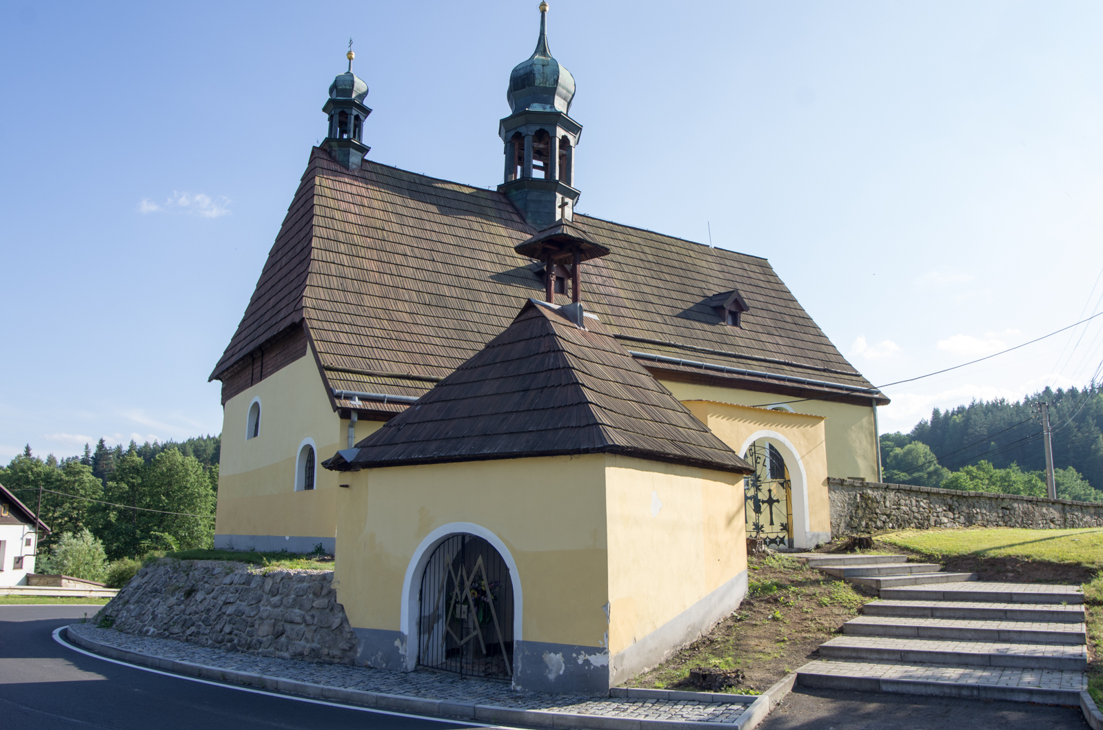 Tatrovice kostel sv. Erharta, Krušné hory, okres Sokolov